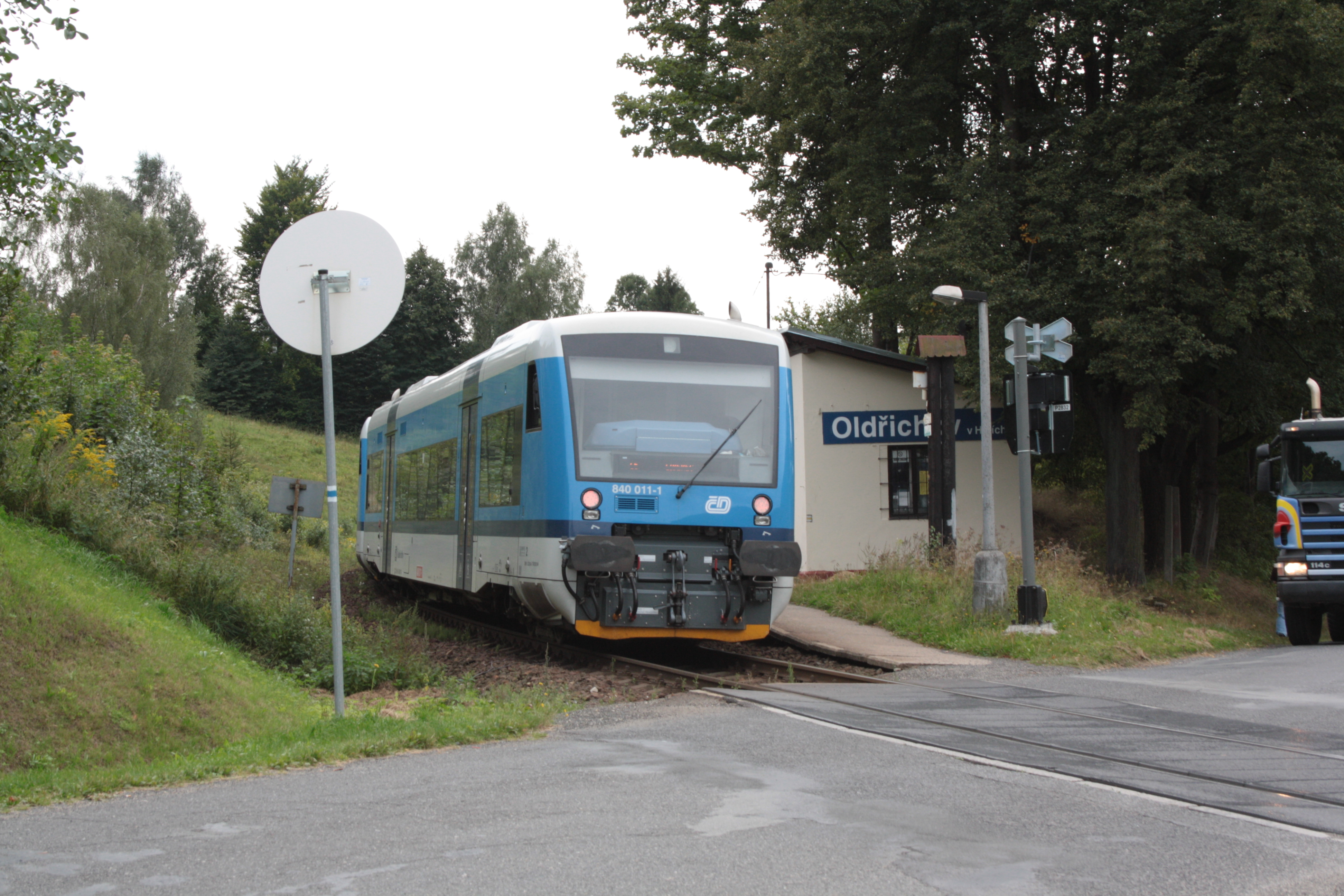 This photograph was taken with a DSLR from WMCZ's Camera grant. Osobní motorová jednotka v železniční zastávce Oldřichov v Hájích.